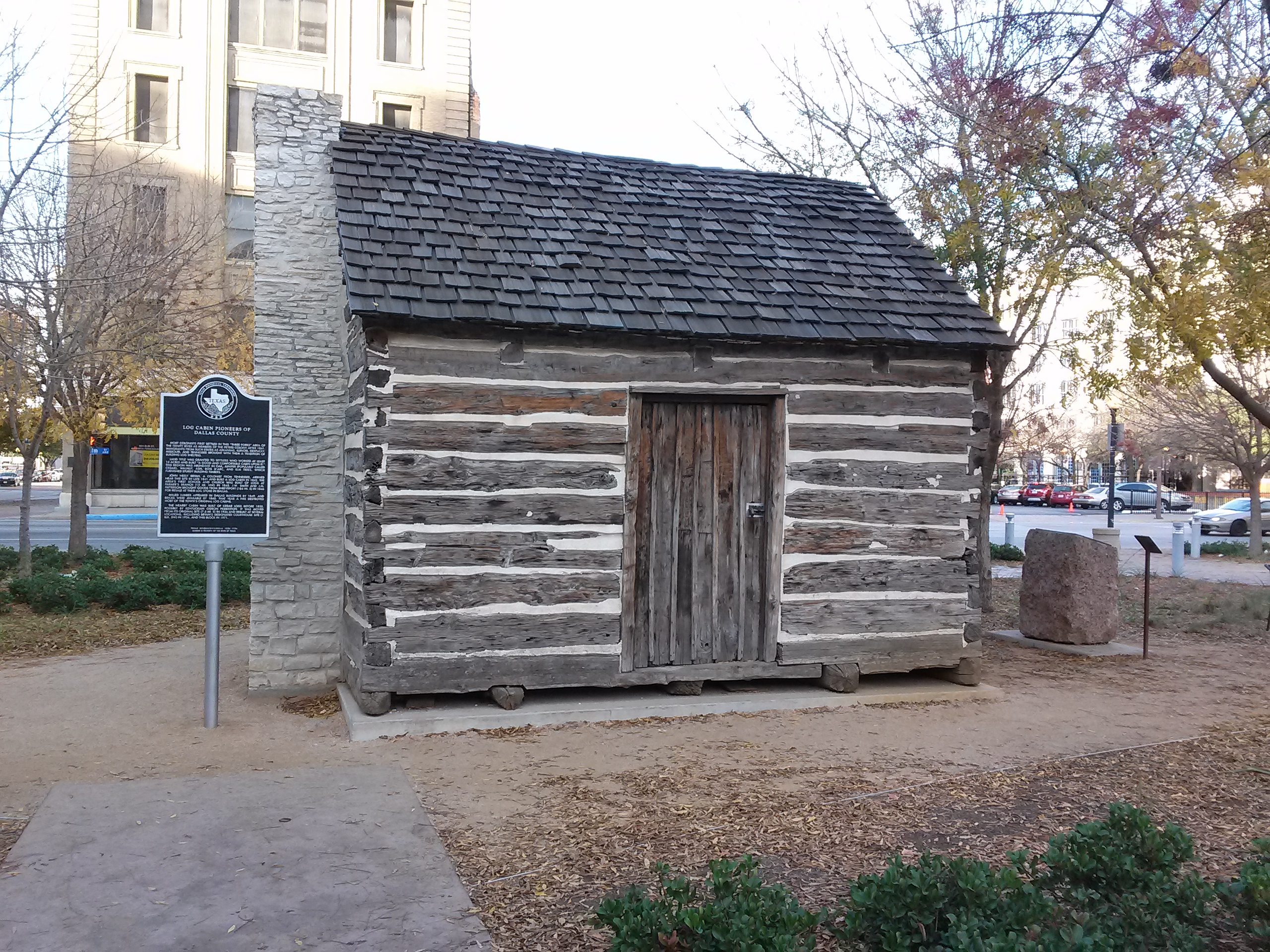 Recreación de las prístinas viviendas de Dallas de primeros habitantes anglos